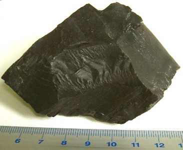 gagat, pochodzenie Polska, autor zdjęcia Ewa Jastrzębska.